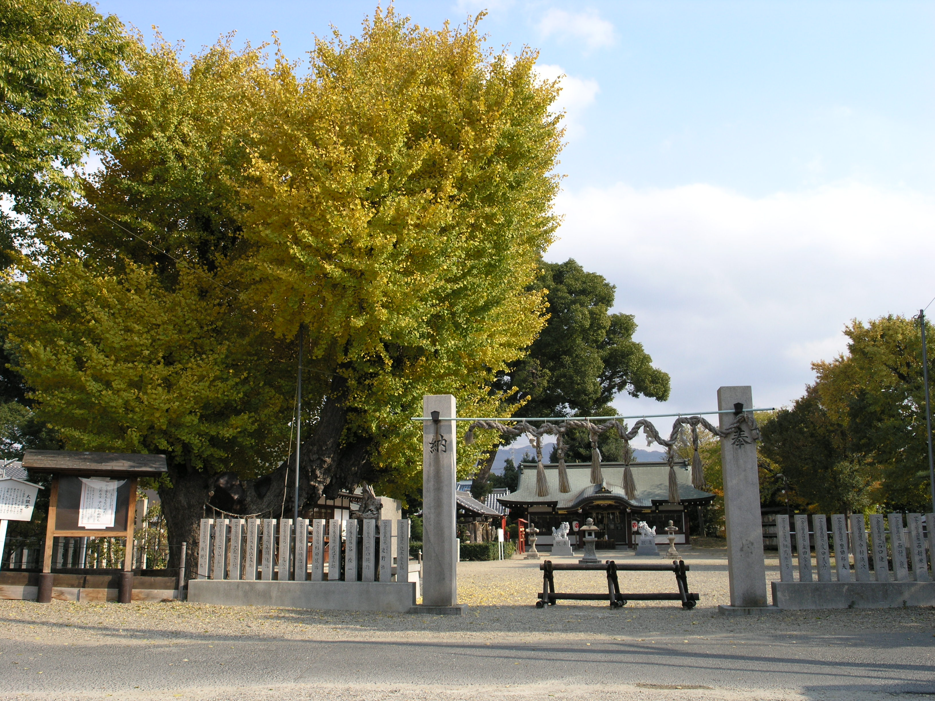 Yahagi Shrine in Yao, Osaka, Japan